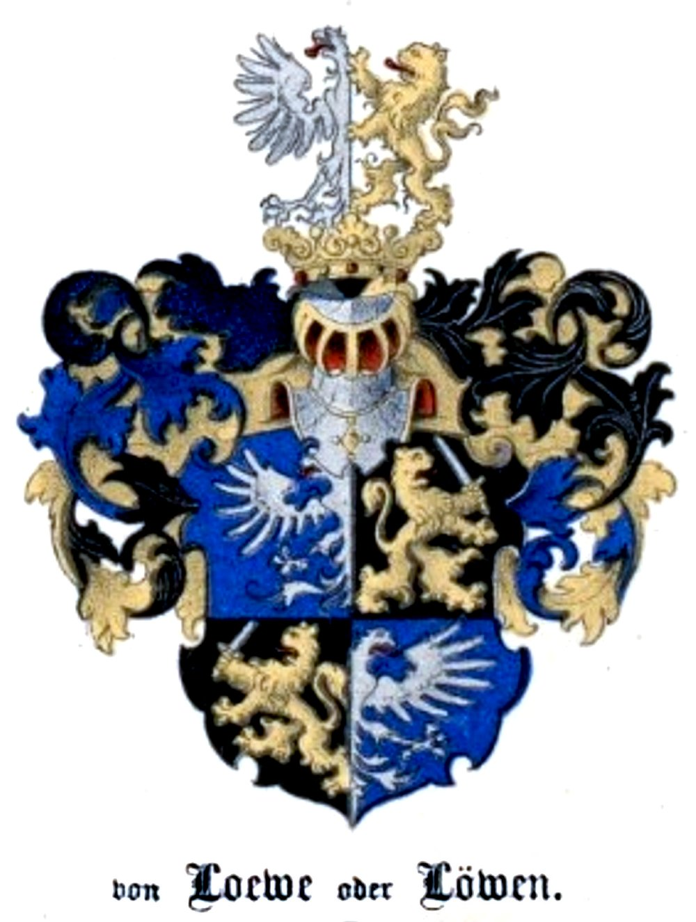 Löweni suguvõsa aadlivapp